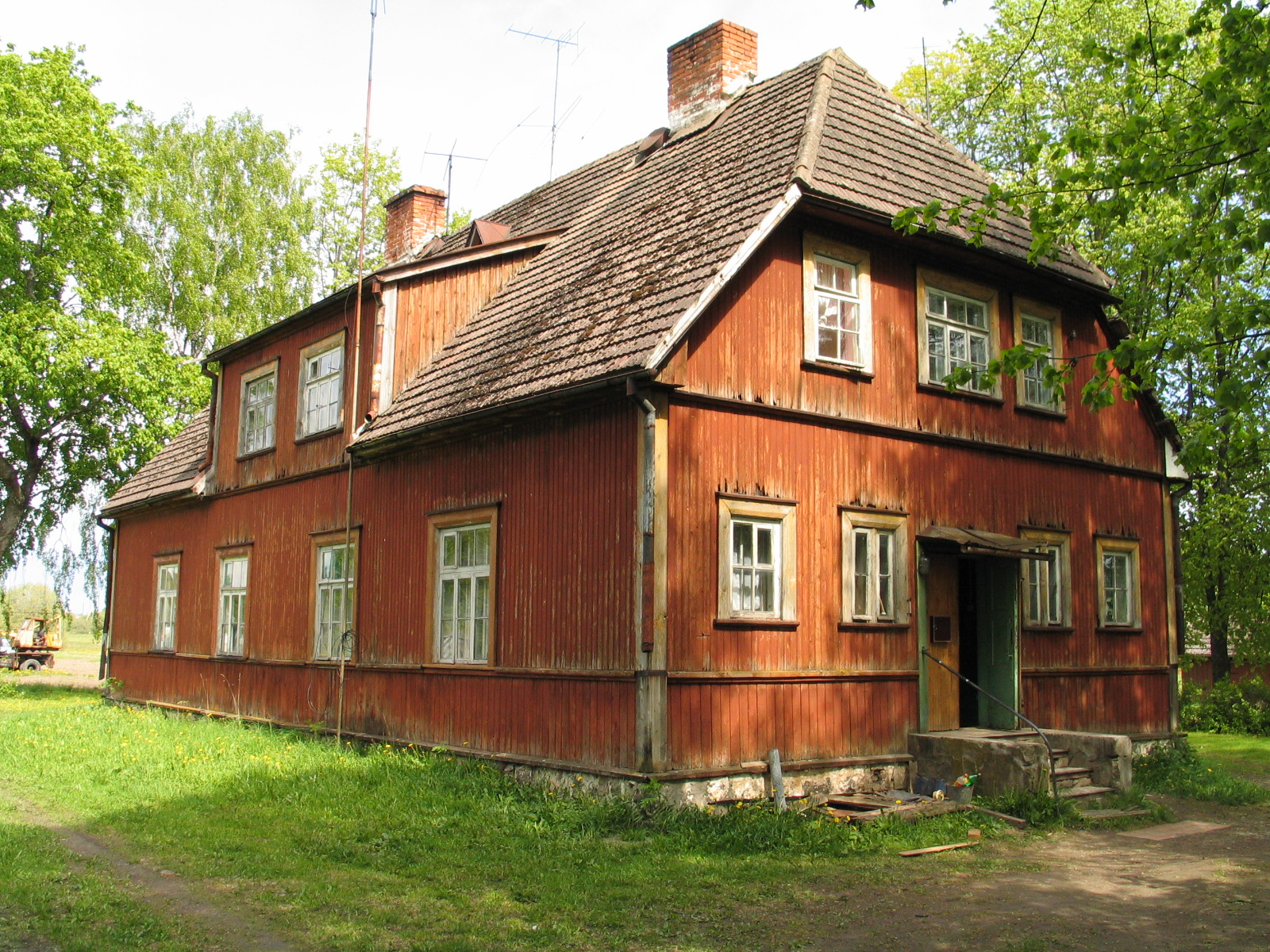 Järva-Jaani jaama puidust elamu